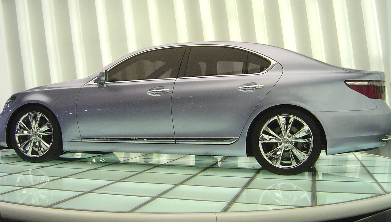 Lexus LF-Sh